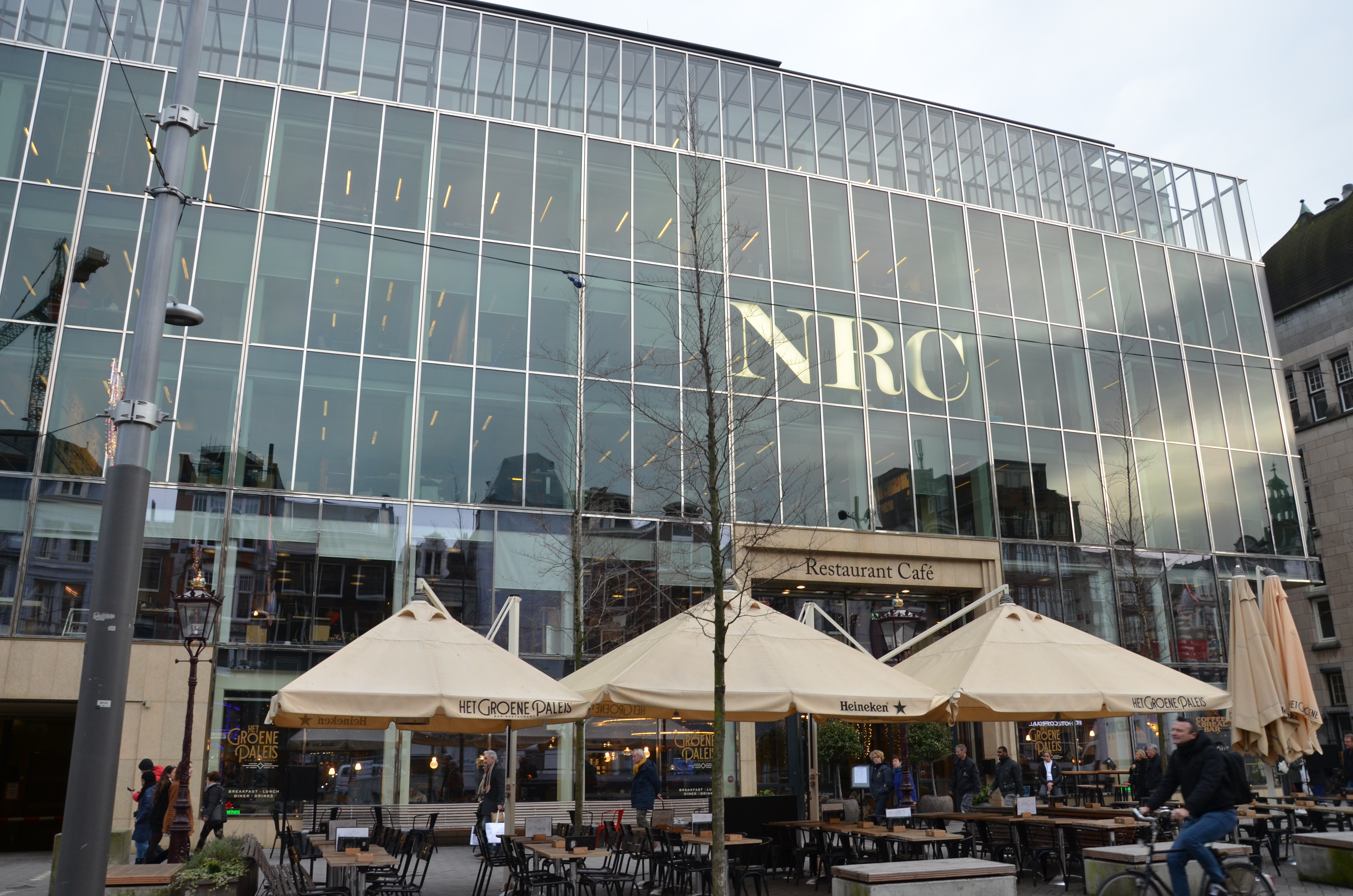 Het kantoor van NRC Handelsblad aan het Rokin 65 in Amsterdam.